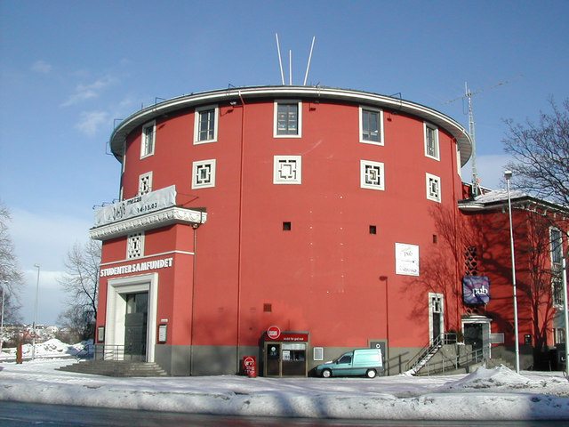 Studentersamfundet i Trondhjem, taken from the front